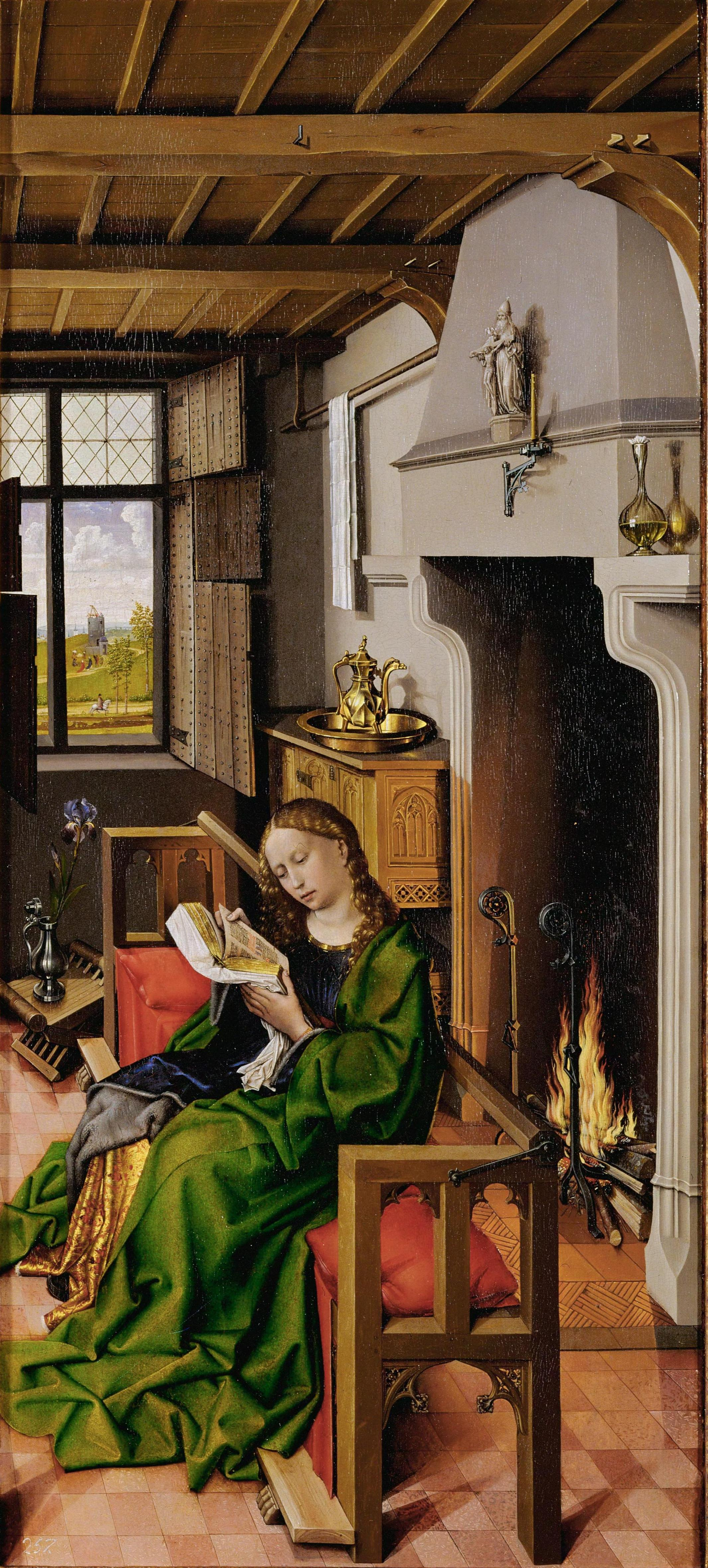 rechter Flügel, Szene: Hl. Barbara